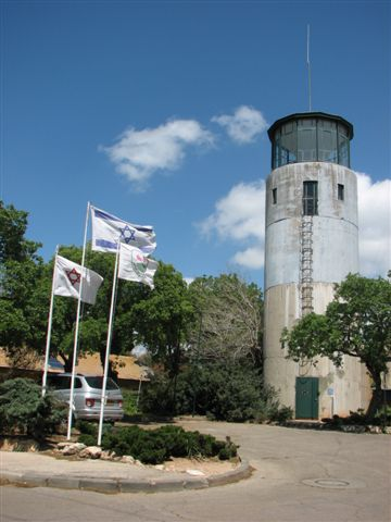 מגדל מים בקרית טבעון התמונה מוקדשת לשולי